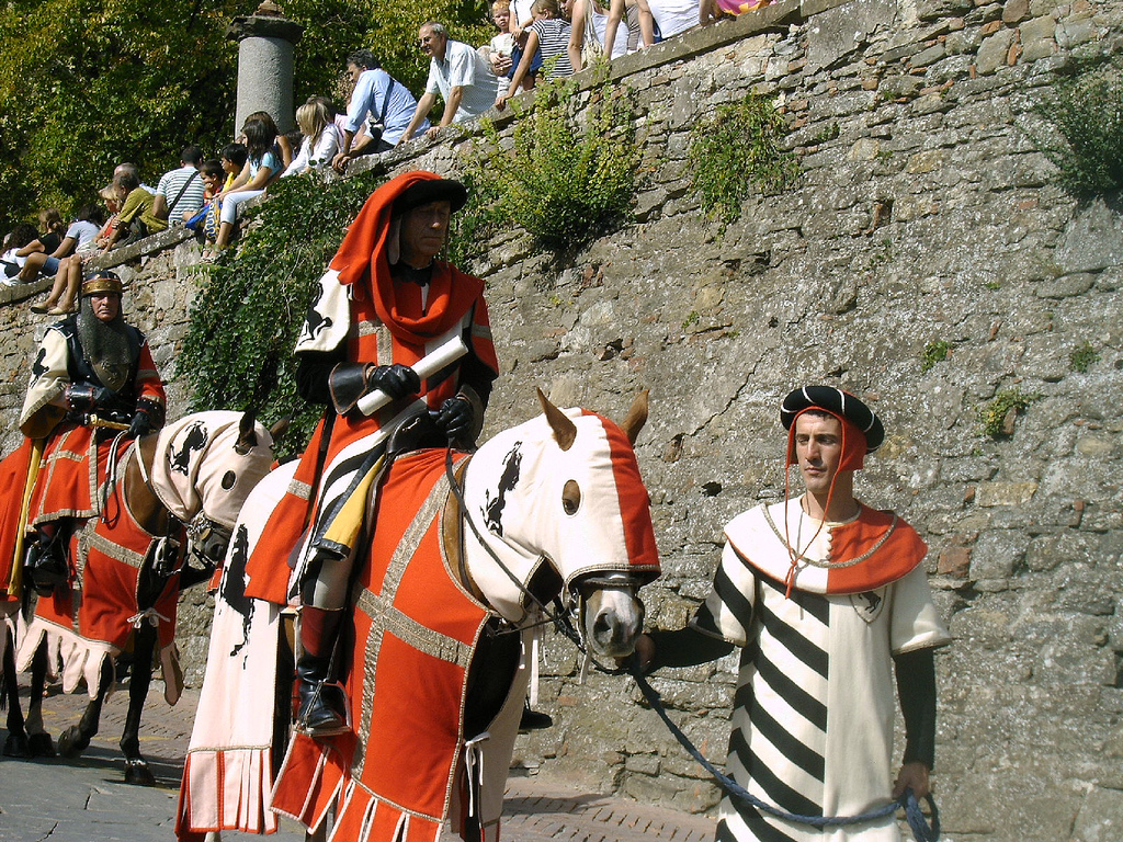 Verona, Veneto, ItaliaGiardino Giusti, Verona, Italy